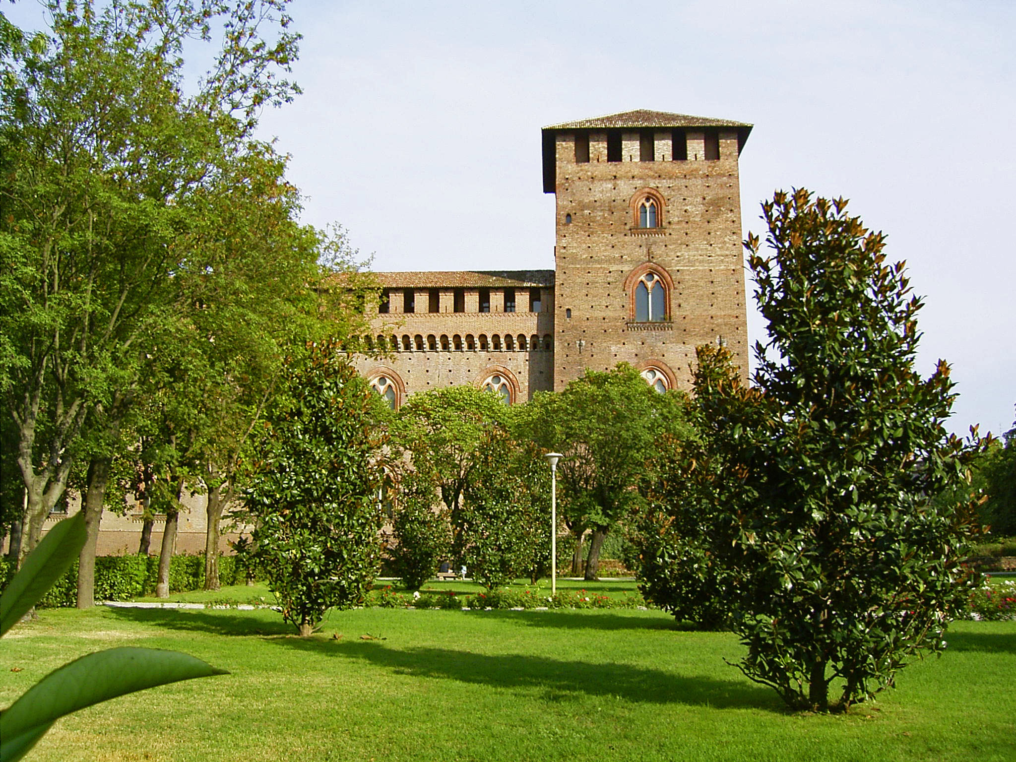 Castello Visconteo, Pavia, Italy. Fu fatto costruire da Galeazzo II Visconti